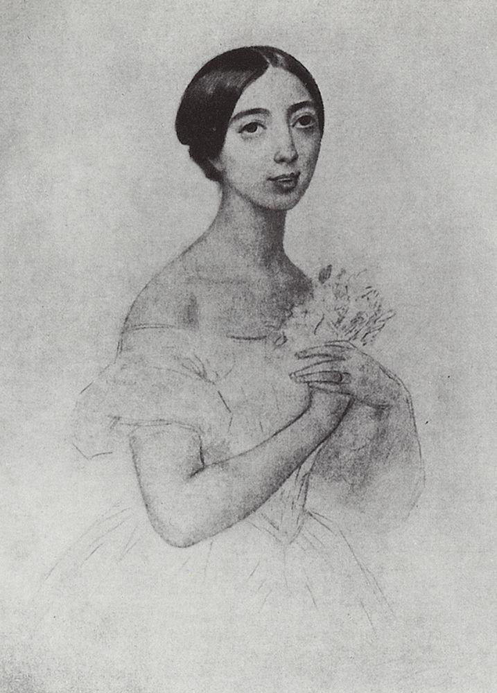 Портрет певицы Полины Виардо Гарсия. 1844